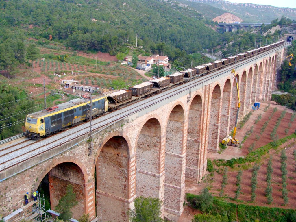 El saler Manresa - Flix, amb la locomotora 250.028 al capdavant, sobre del pont de la riera de Boixadell, al costat mateix de la clausurada estació d'Olesa de Montserrat.